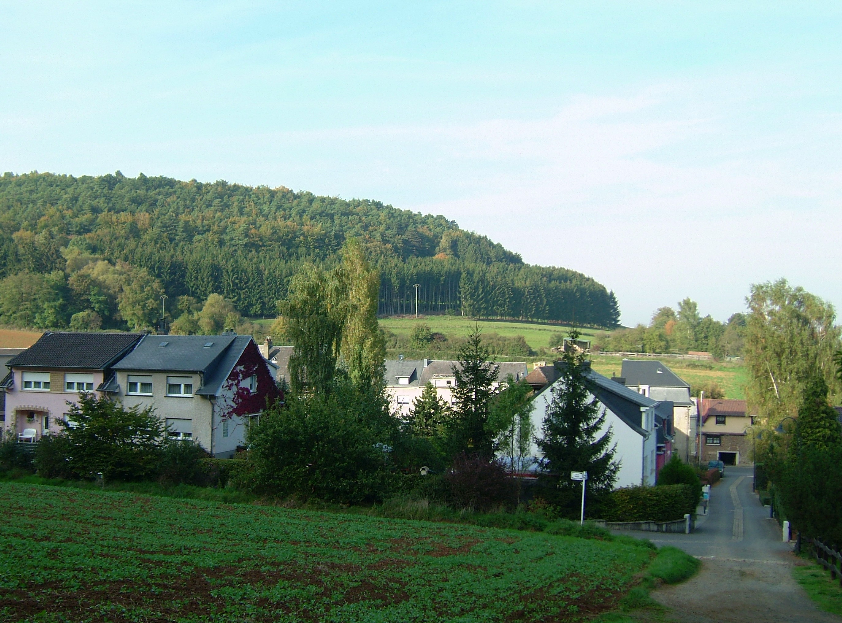 Bromeschbierg